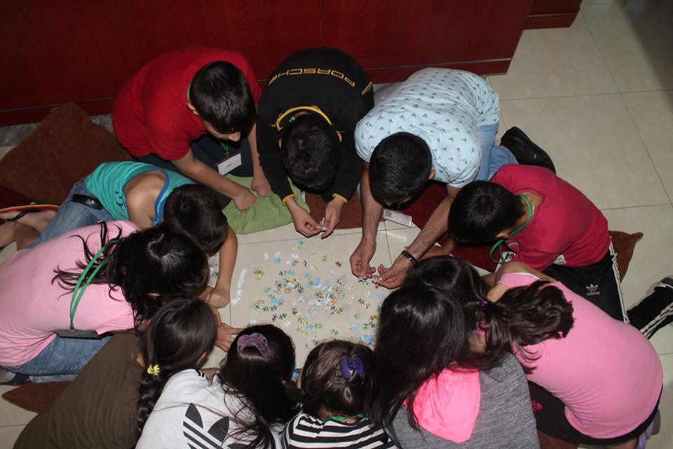 Վիքիճամբար